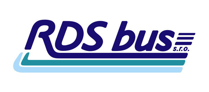 Logo RDS Bus